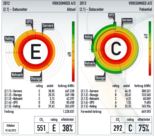 Dette viser Energihjulet for en virksomhed, med udvalgte områder for forbrug og energieffektivitet. Der benyttes den internationale A-G skala.